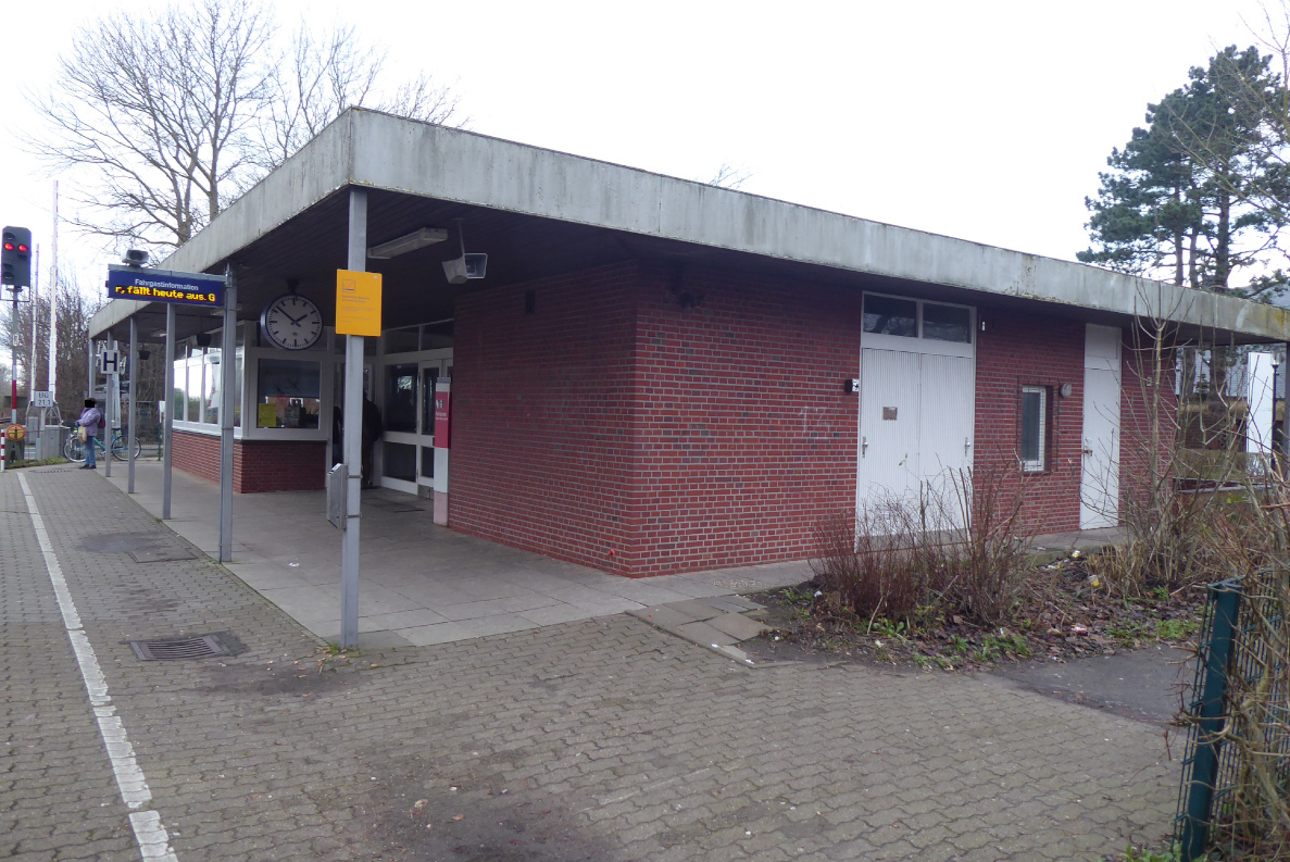 Bahnhof Tönning